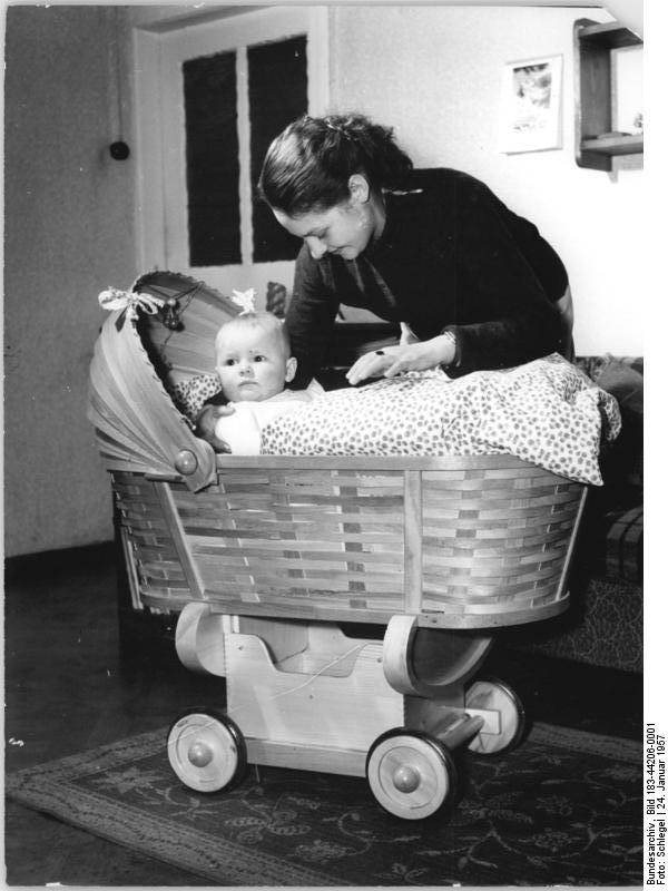 Stubenwagen als Kinderwagen Zentralbild Schlegel 24.1.1957 Neue Kinderecke von der Firma Flemming aus Globenstein. Von der Privatfirma Flemming KG in Globenstein /Ergeb. wird eine Kinderecke hergestellt, zu der ein Stubenwagen, eine Tischtruhe, sowie ein Kinderfahrstuhl gehören. Diese Einrichtungsgegenstände können zerlegt und in Teilen zu anderen Zwecken verwendet werden. Wird z.B. vom Stubenwagen das Fahrgestell abgenommen, so kann er als Wiege benutzt werden, während die Räder mit dem ursprünglichen Windelkasten einen Spielkasten ergeben. Der Kasten kann auch als Fußbank dienen. Der Korb, in dem das Kleinkind liegt, kann als Wäschekorb verwendet werden. Für die Konstruktion der Kinderecke erhielt die Firma Flemming KG in Globenstein ein Diplom des Ministeriums für Handel und Versorgung. In ihm wird besonders die Erweiterung des Sortiments und die Einsparung von Rohstoffen hervorgehoben, die durch diese Kombination erreicht wird. UBz: Der Stubenwagen. Wenn das Fahrgestell abgenommen wird, kann er als Wiege benutzt werden. Wird das Kind älter, kann die Truhe als Wäschekorb benutzt werden.